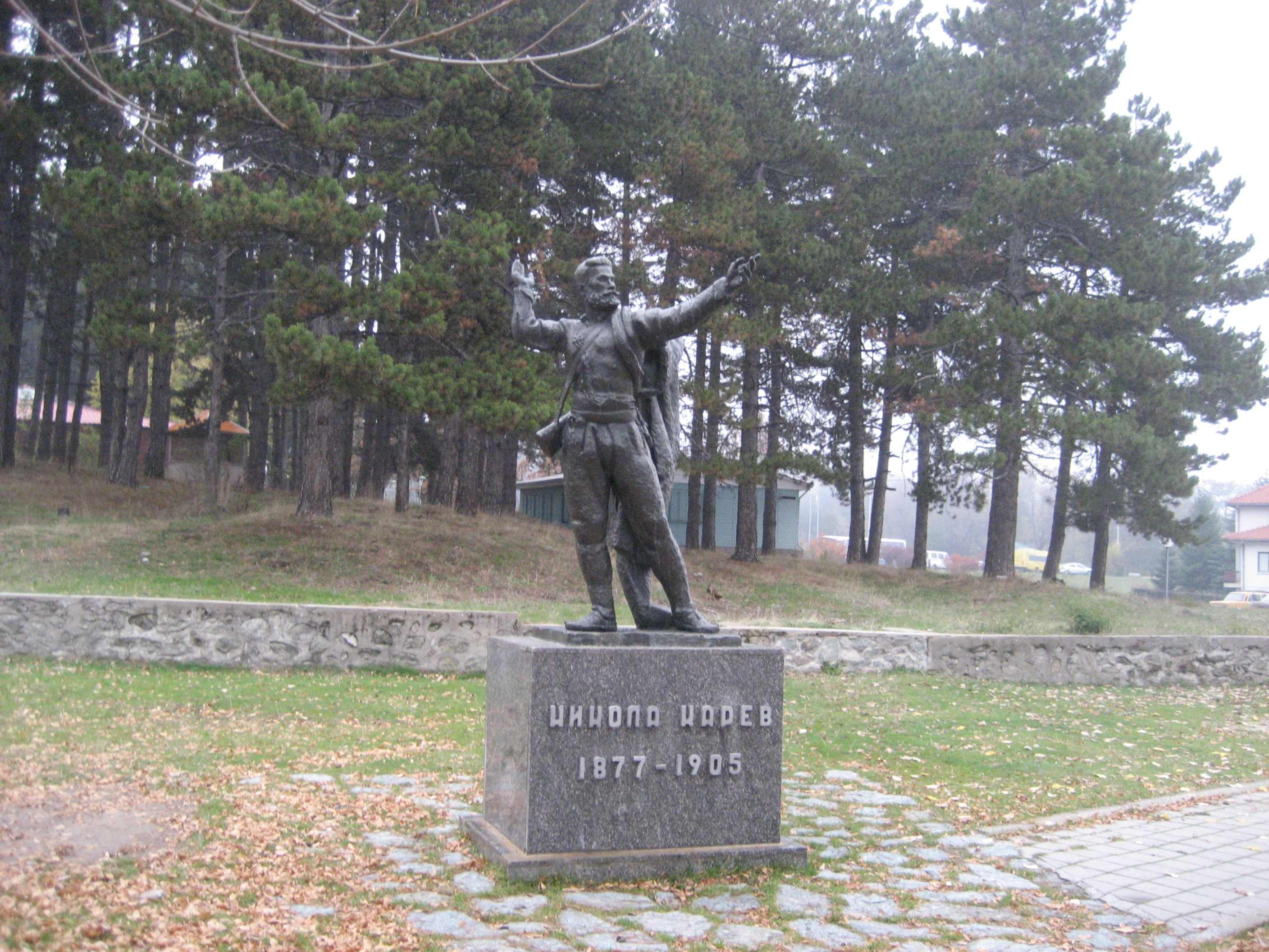 Nikola Karev Denkmal, Krusevo